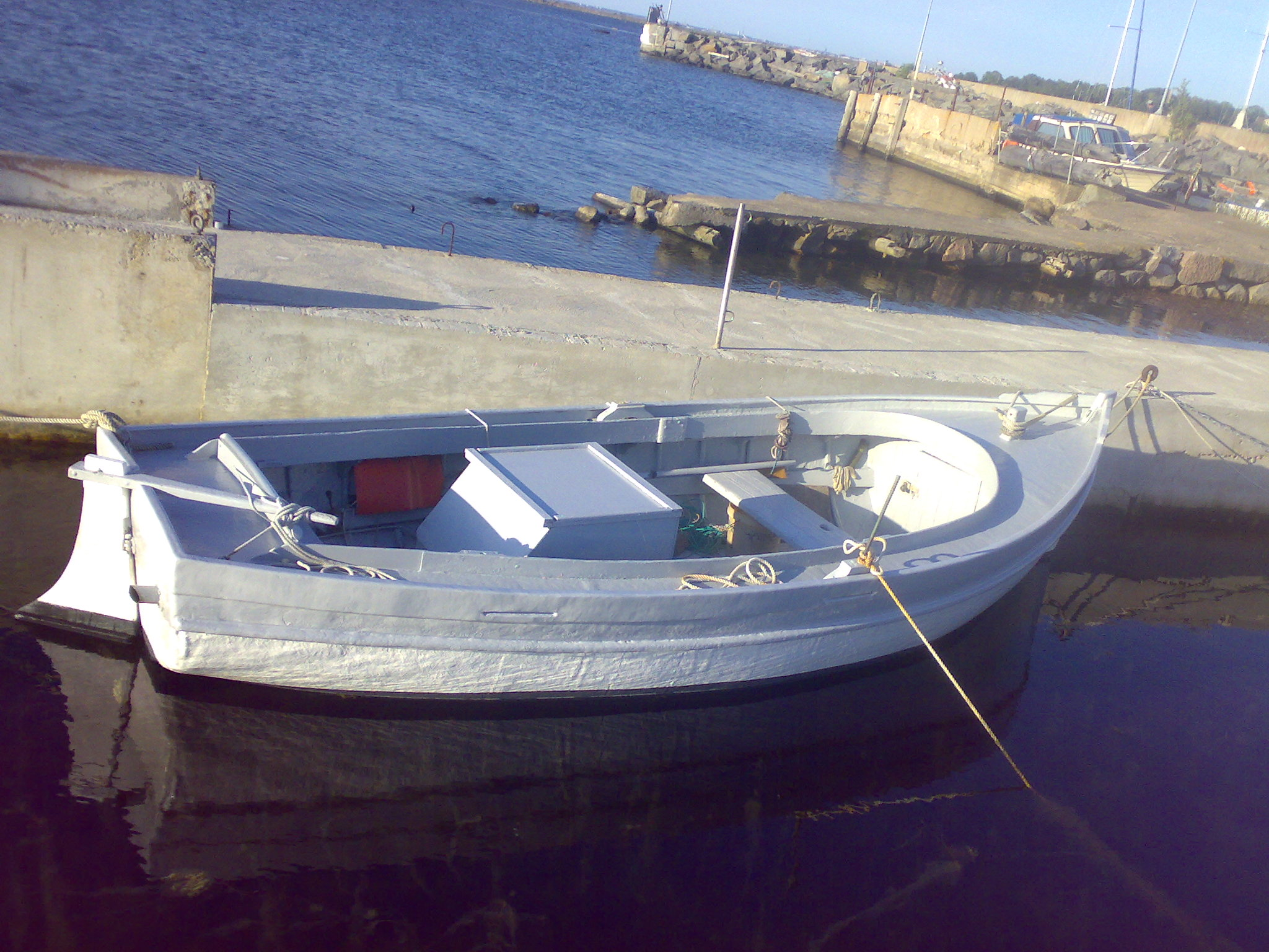 Motor boat, motorbåt, Blekinge, Sweden, Sverige